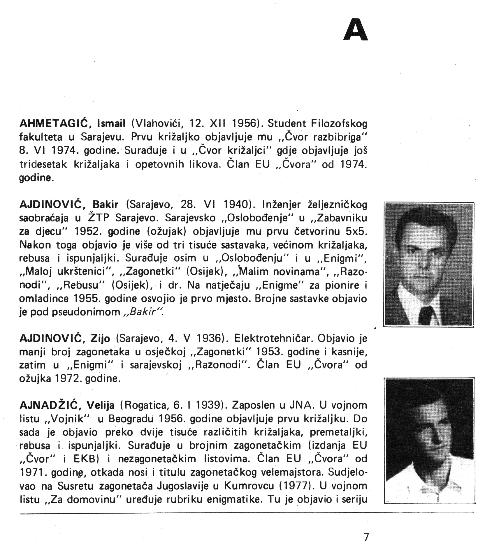 Leksikon zagonetača Jugoslavije, knjiga Stjepana Horvata